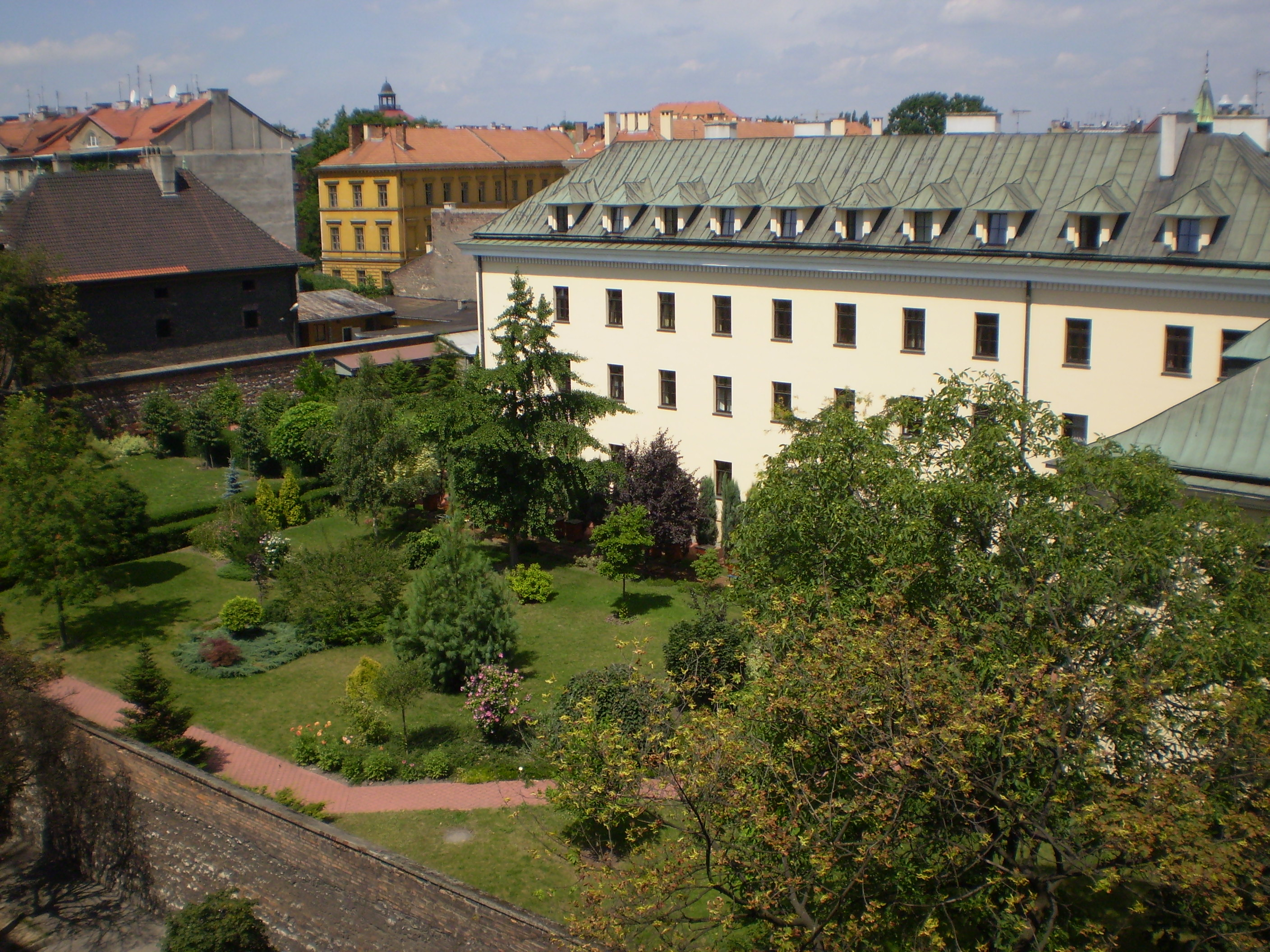 Order of Friars Minor's Convent,11 Loretańska street,Kraków,Poland